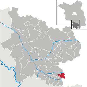 Schraden in Brandenburg (Country) - District Elbe-Elster